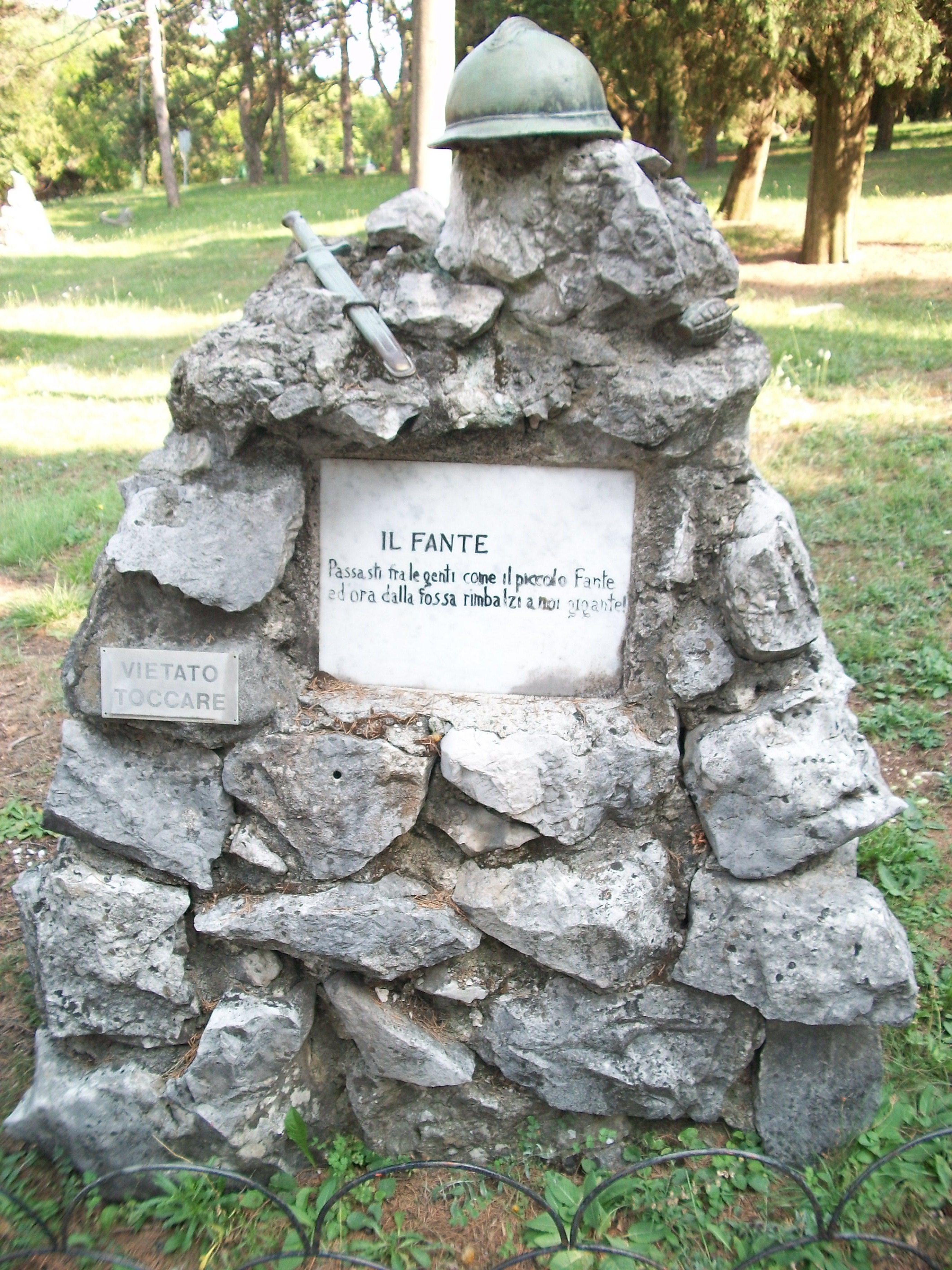 34070 San Pier d'Isonzo, Province of Gorizia, Italy